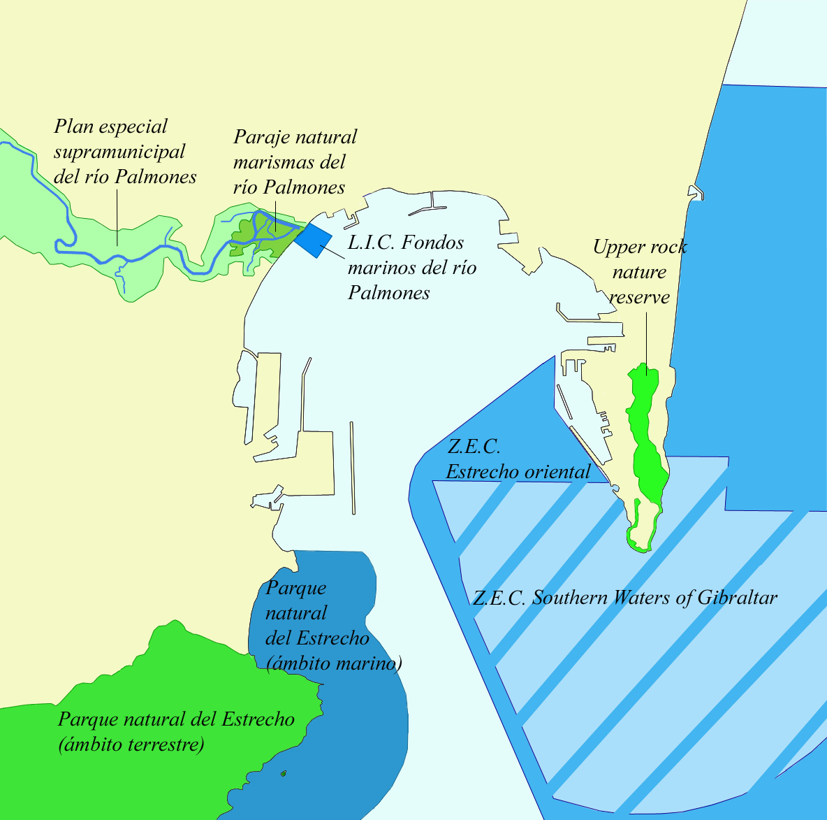 Mapa indicativo de las zonas protegidas medioambientalmente en la bahía de Algeciras.